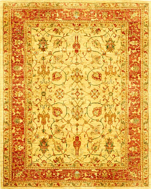 Deze foto heb ik gemaakt van mijn eigen zieglertapijt.